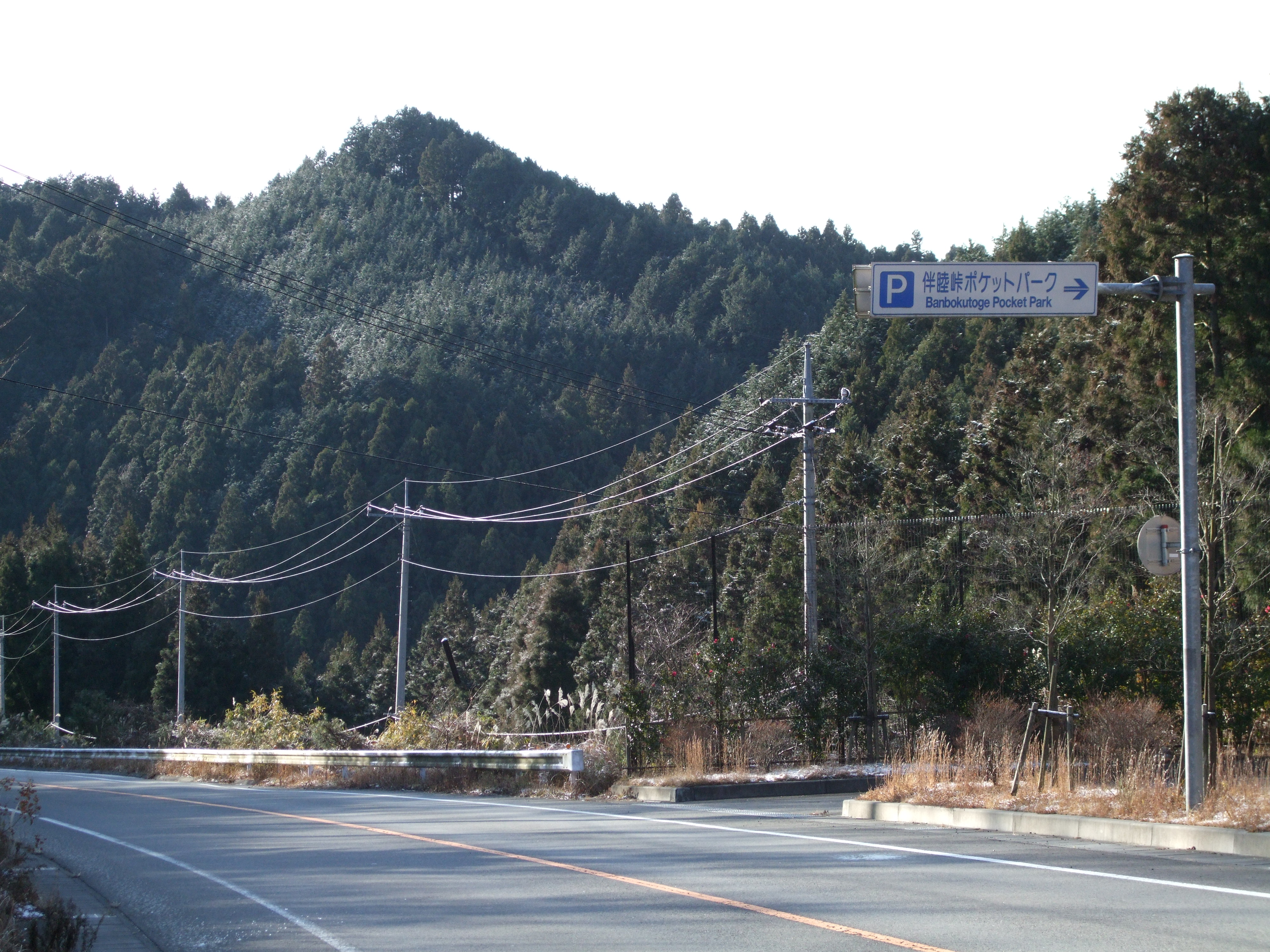 Banboku-pass on R293 in Tochigi,Japan